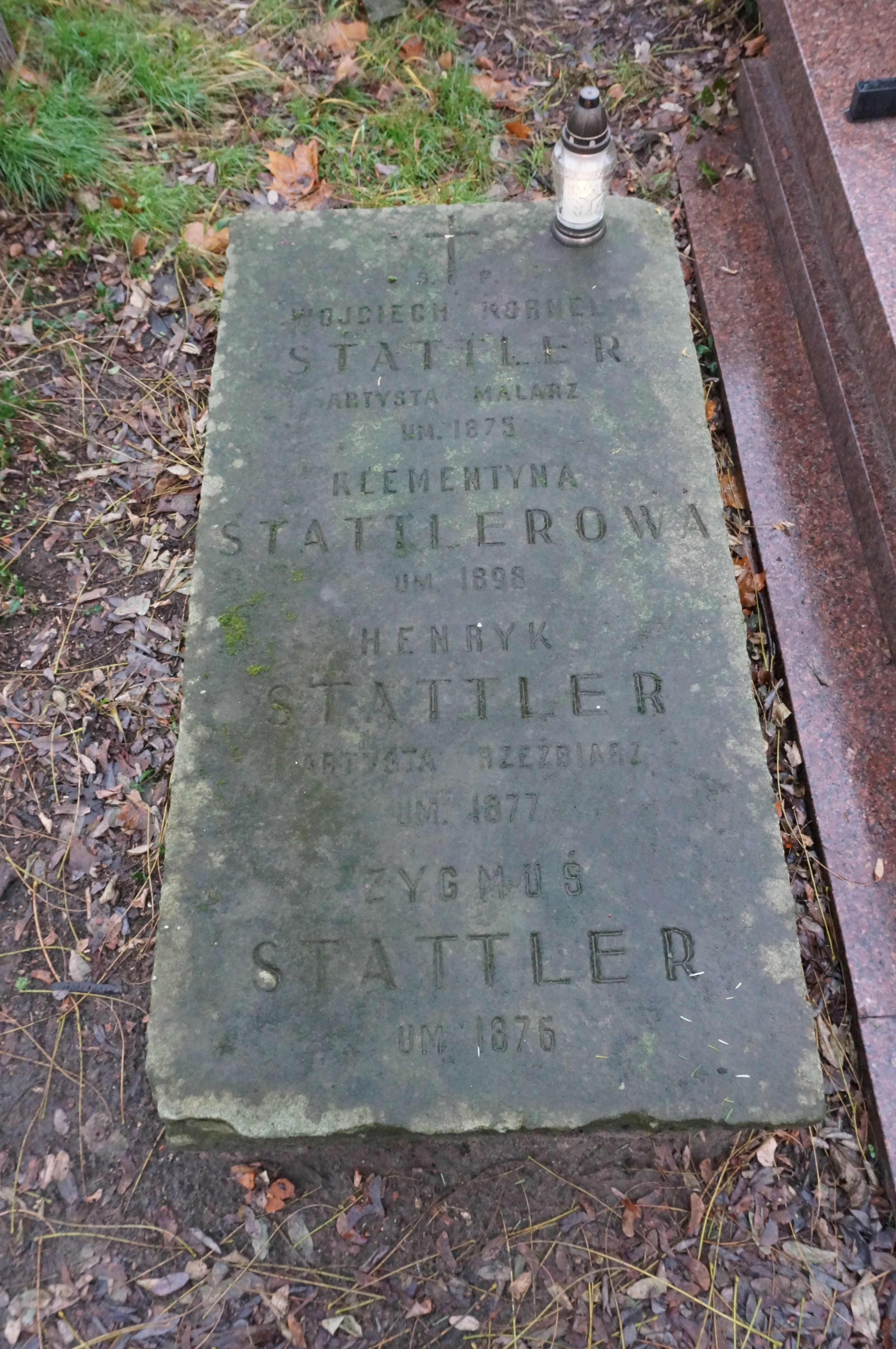 Grób Wojciecha Stattlera na Cmentarzu Powązkowskim (kwatera 75, rząd 2, grób 22)